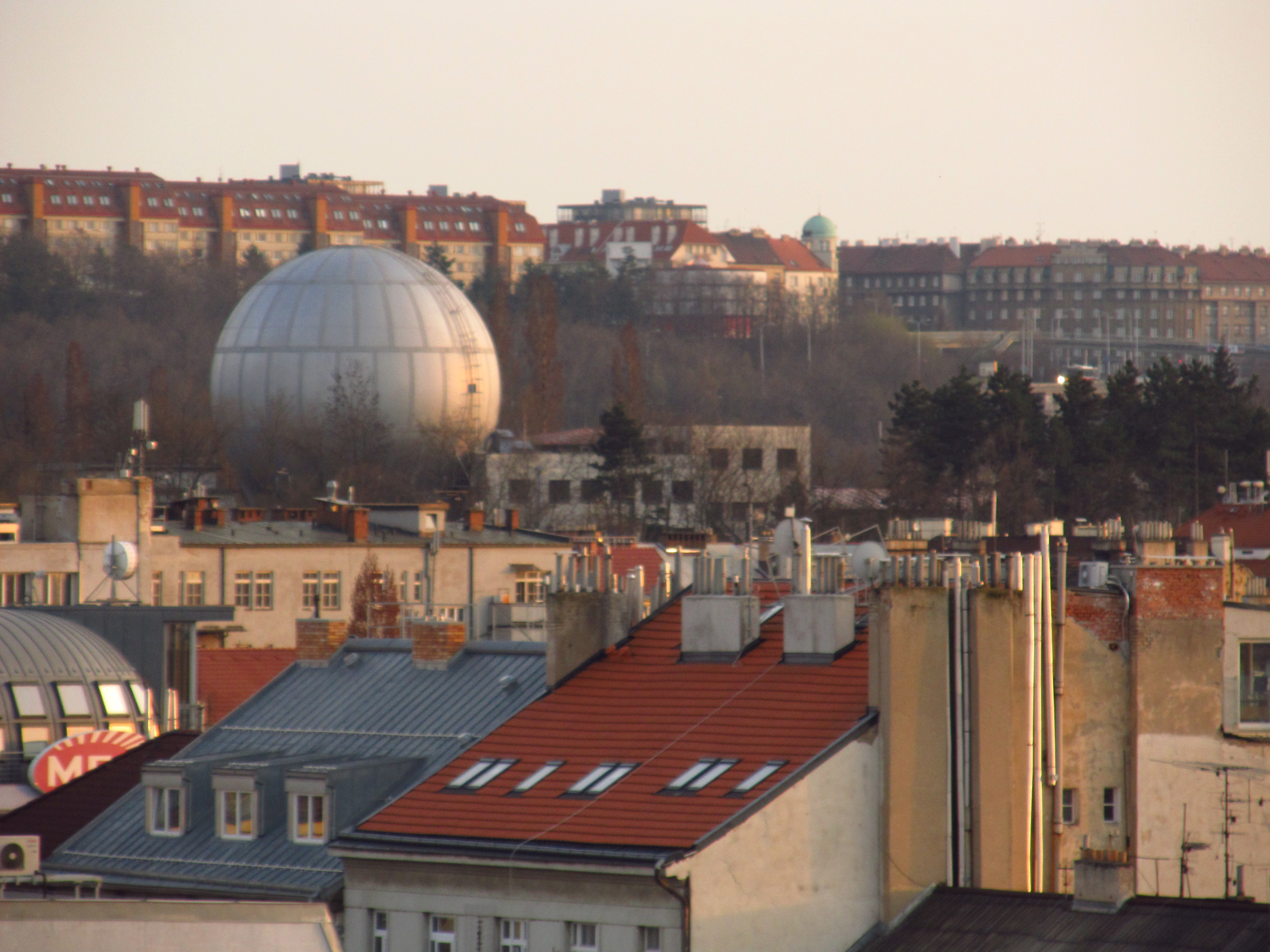 Plynojem Pražské obecní plynárny, Praha 8-Libeň, Zenklova, Sokolovská, V Mezihoří